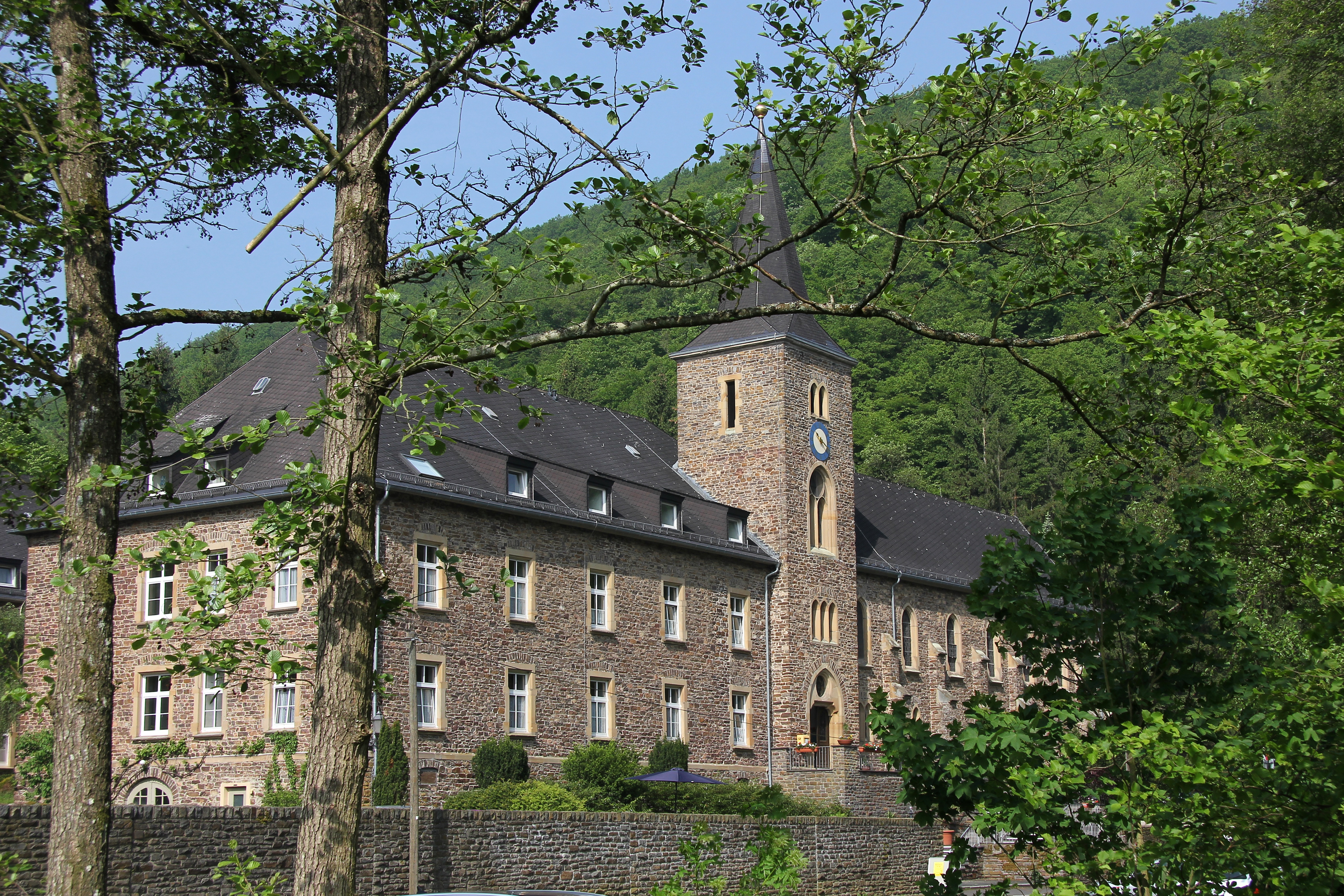 Kloster Maria Engelport im Flaumbachtal bei Treis-Karden